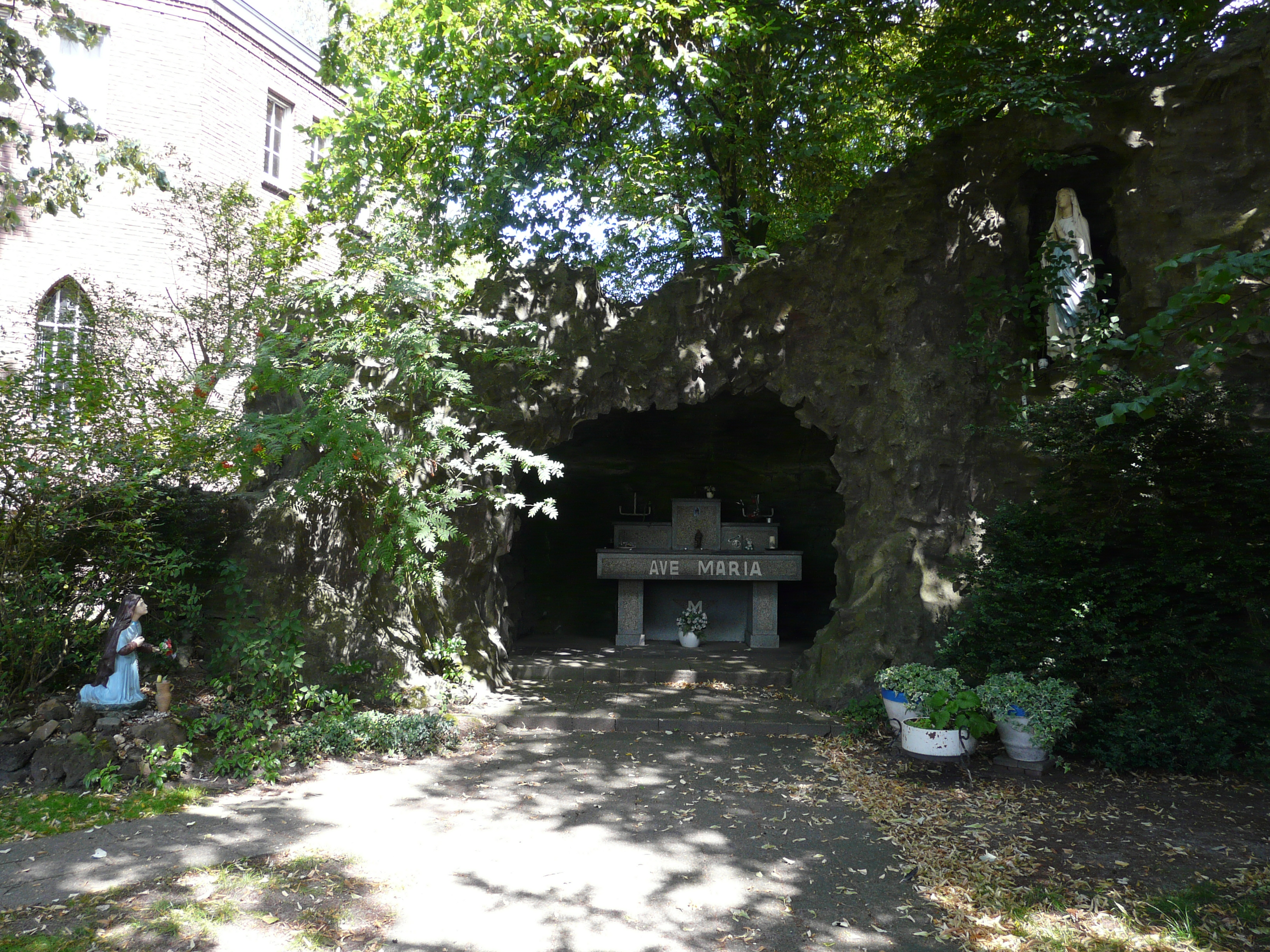 Lourdesgrot achter de Theresia van Lisieuxkerk in Waspik-Zuid